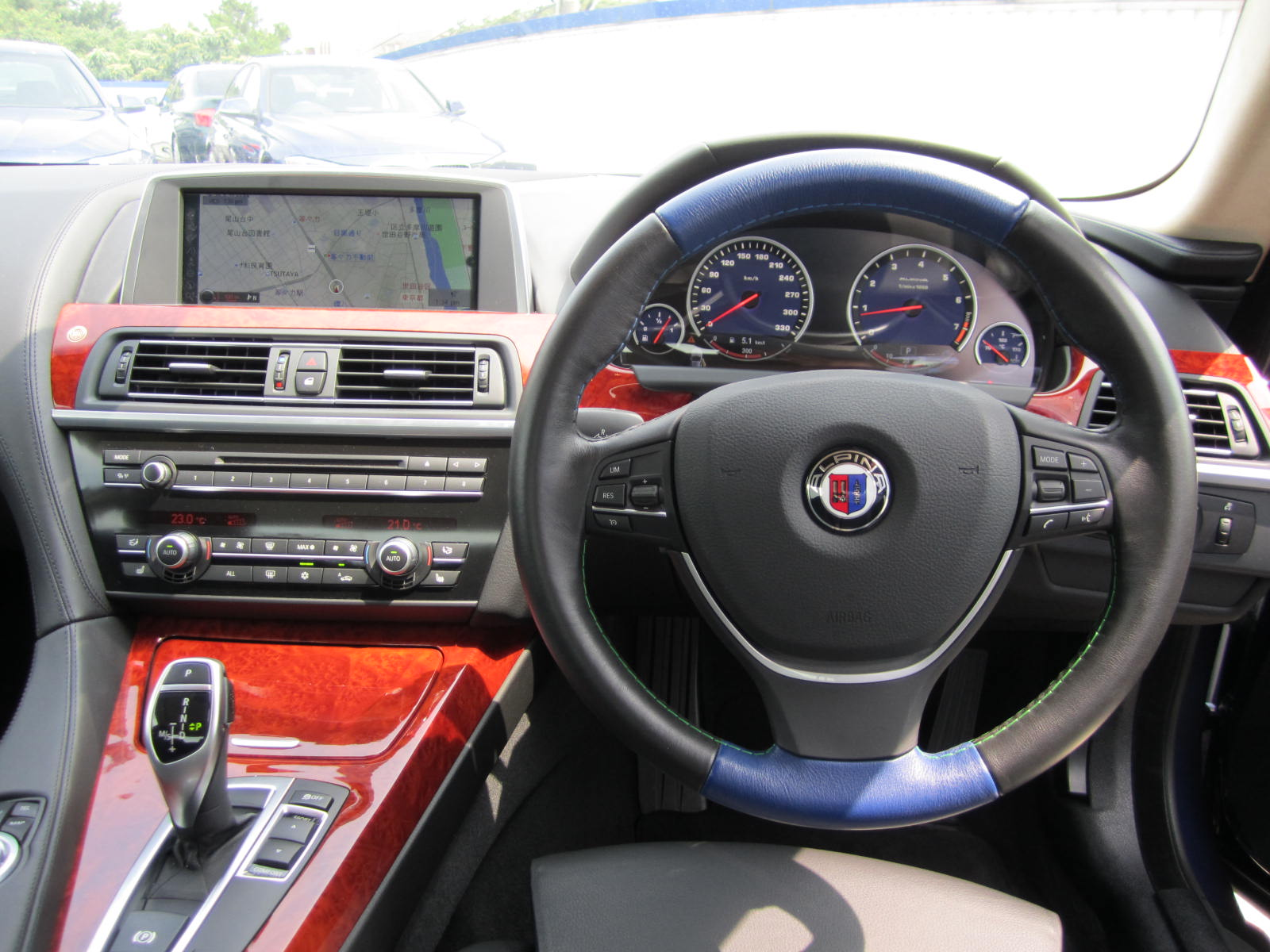 B6クーペ内装